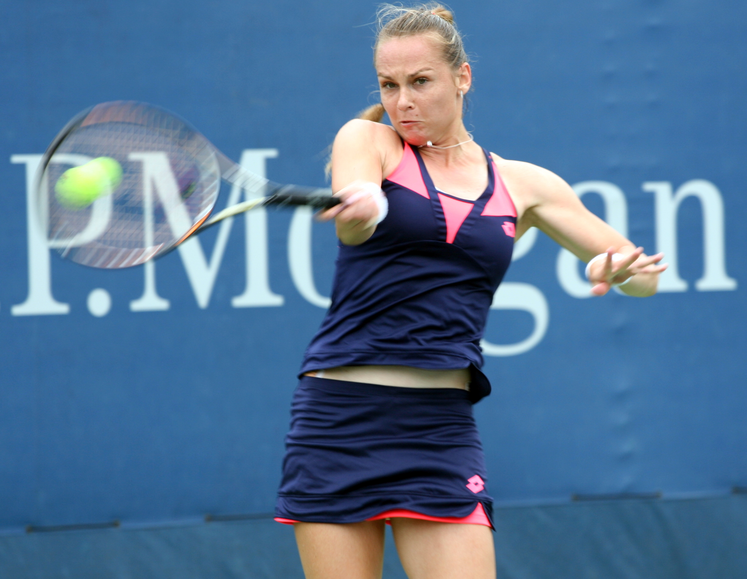 Magdaléna Rybáriková, Monday, August 26 2013 US Open